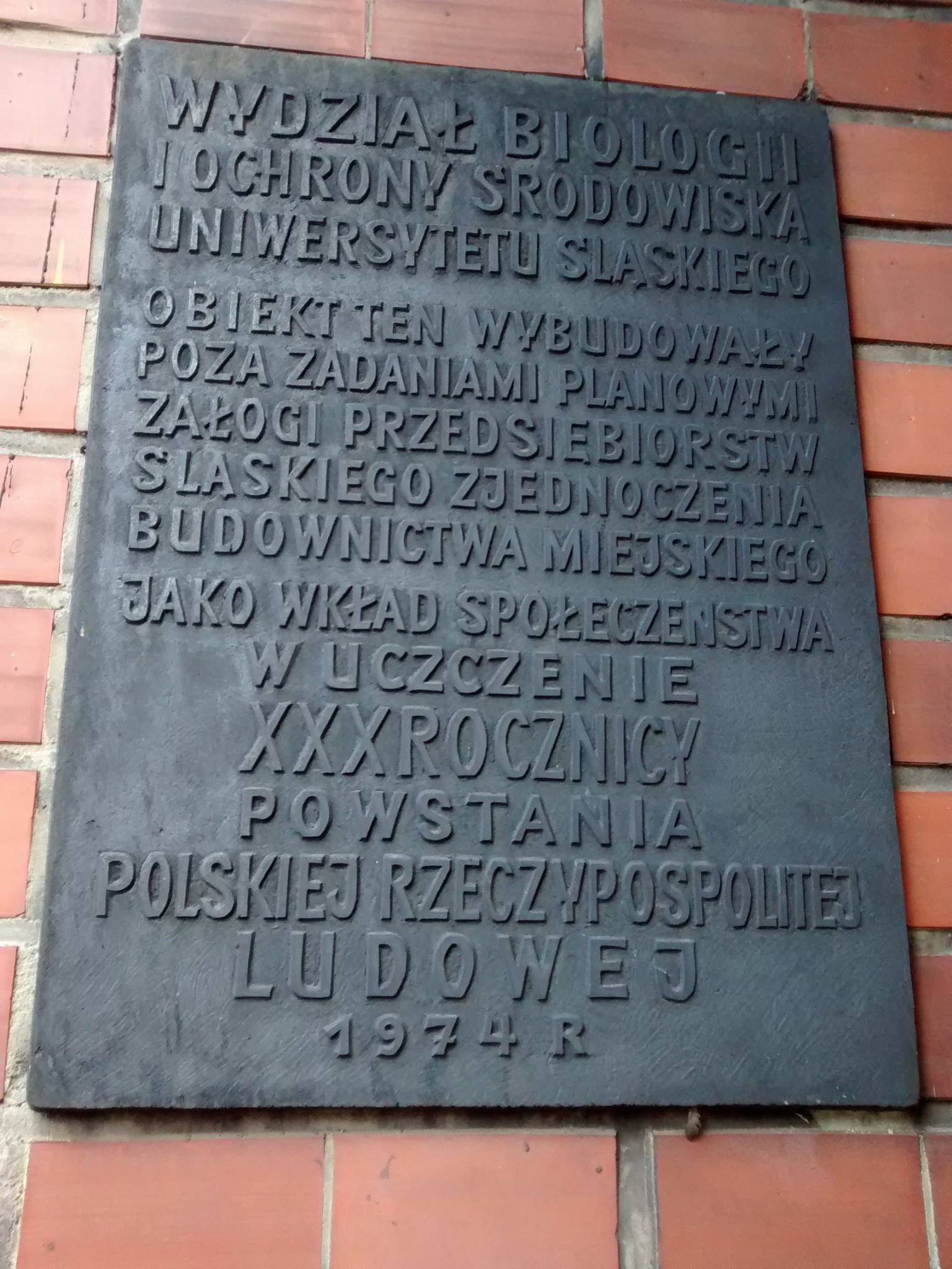 Tablica pamiątkowa z 1974 roku na fasadzie gmachu Wydziału Biologii i Ochrony Środowiska Uniwersytet Śląski w Katowicach przy ul. Bankowej 9 w Katowicach.